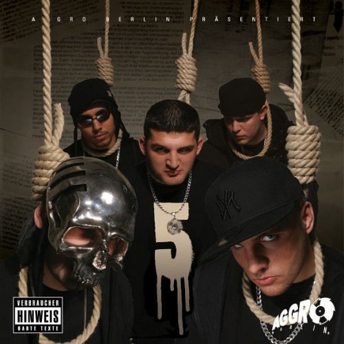 Cover des Samplers „Aggro Ansage Nr. 5“